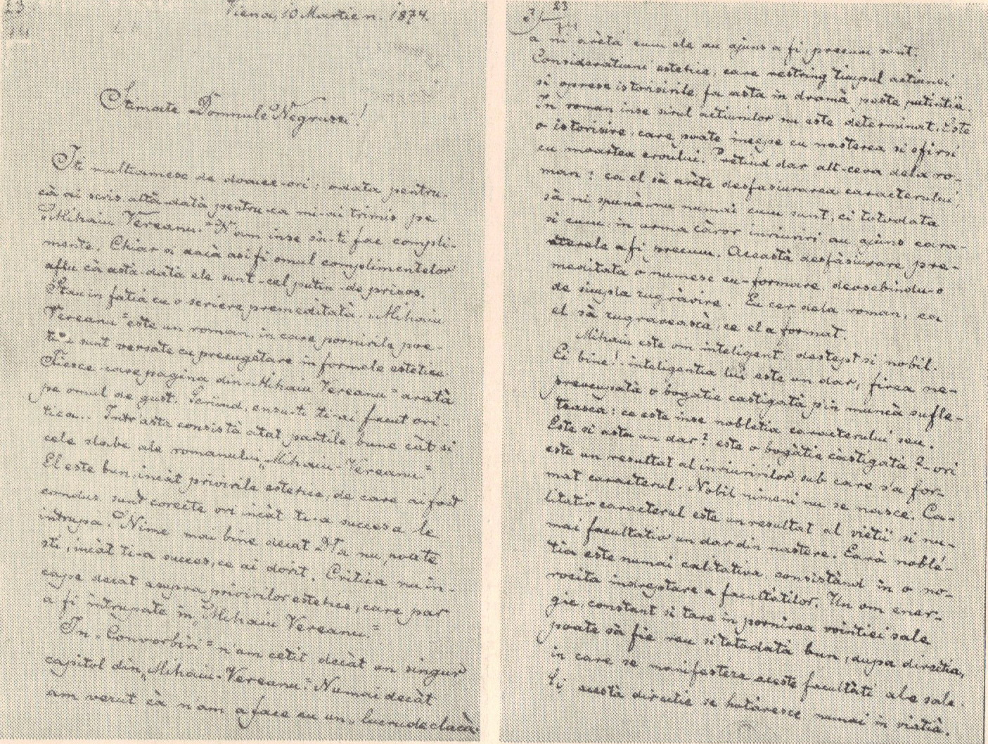 Pagini din scrisoarea lui I. Slavici către I. Negruzzi din 10 martie 1874, în care își expune opiniile asupra structurii romanului ca gen literar (Manuscris aflat la Biblioteca Academiei Române)